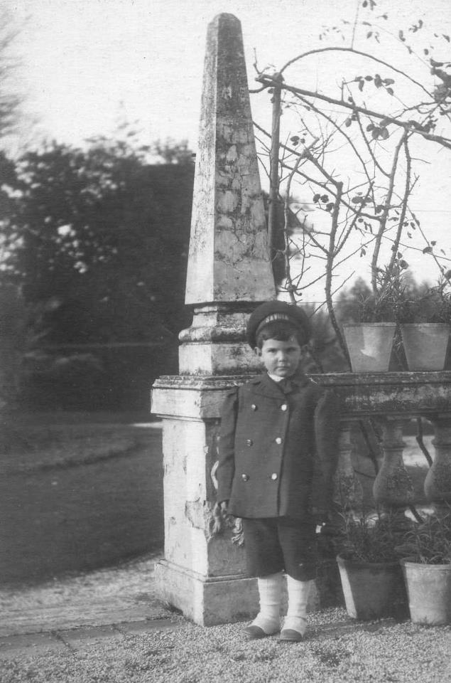 Terzo compleanno del Principe Umberto